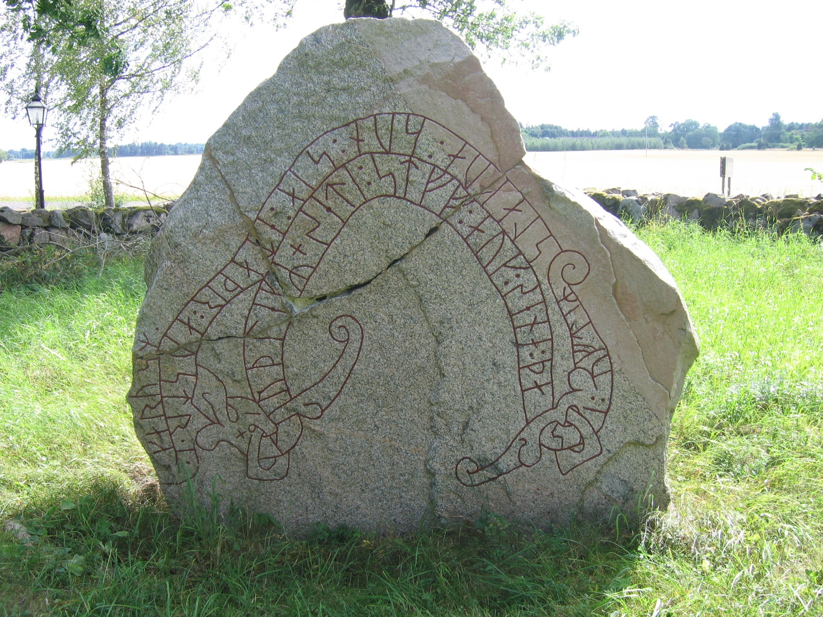 Runestone Vs 1 at Stora Rytterne kyrka, Västerås.